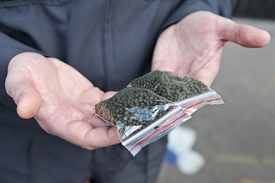 Бывает насвай и такого цвета